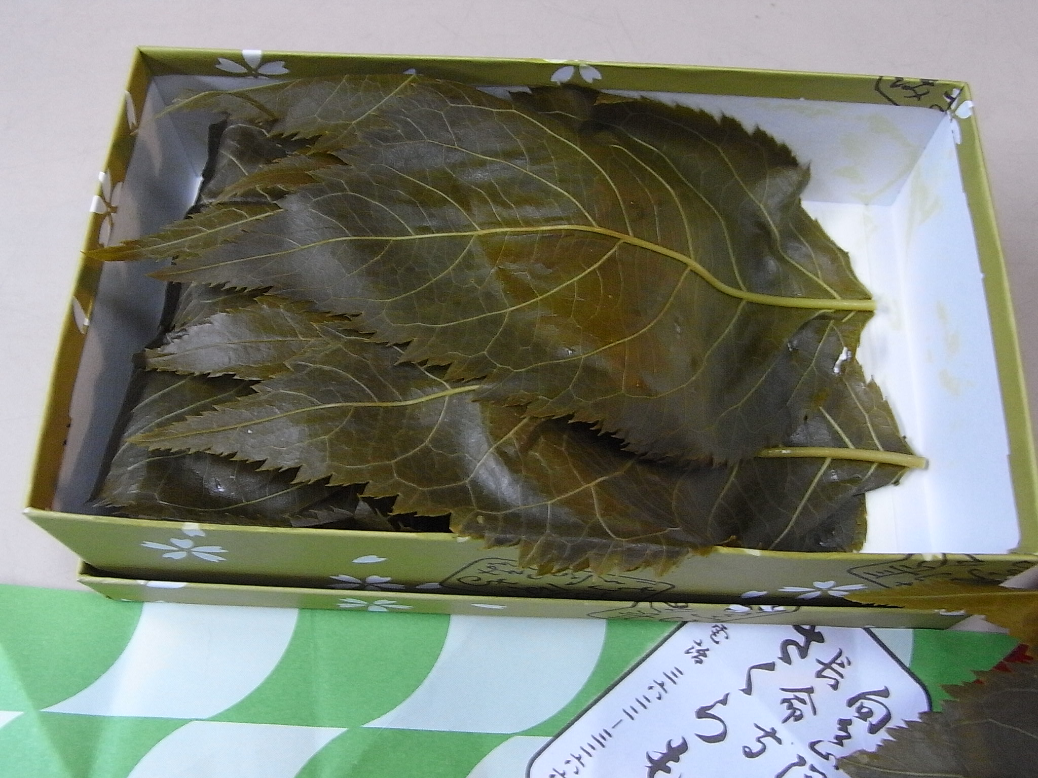 長命寺桜もち